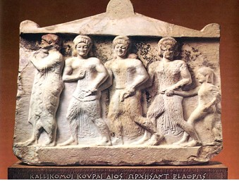 Ο χορός των θυγατέρων του Κέκροπα και του μικρού Εριχθονίου στην παράσταση του αναθηματικού γλυπτού της εικόνας θυμίζει ζωηρά σύγχρονους παραδοσιακούς χορούς.